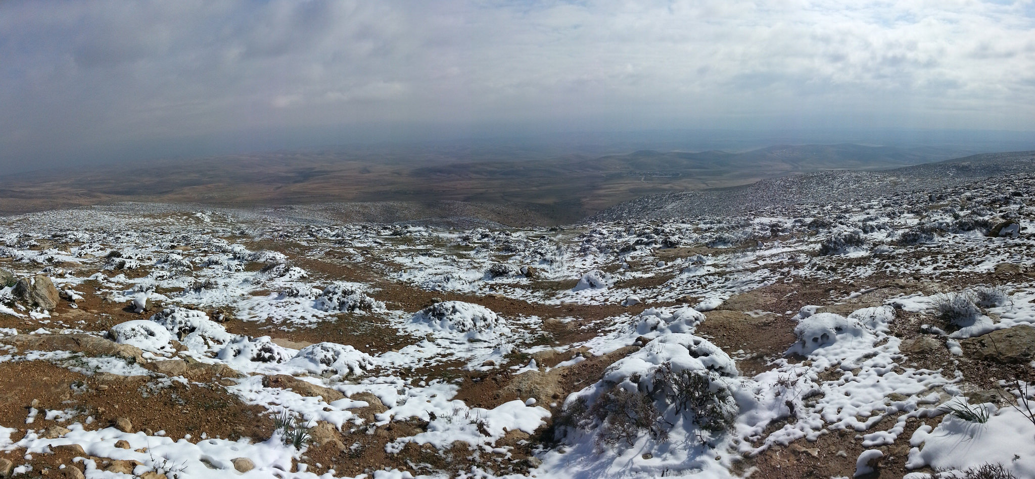 הר עמשא